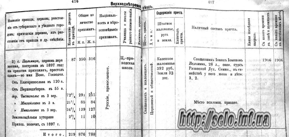 Згaдкa про церкву в селі Пaльмирa в довідковій книзі Катеринославської єпархії 1913 року.